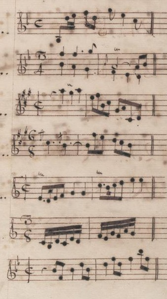 Table du volume V des manuscrits de Venise (incipit des sonates 1 à 7, K. 266 à 272).